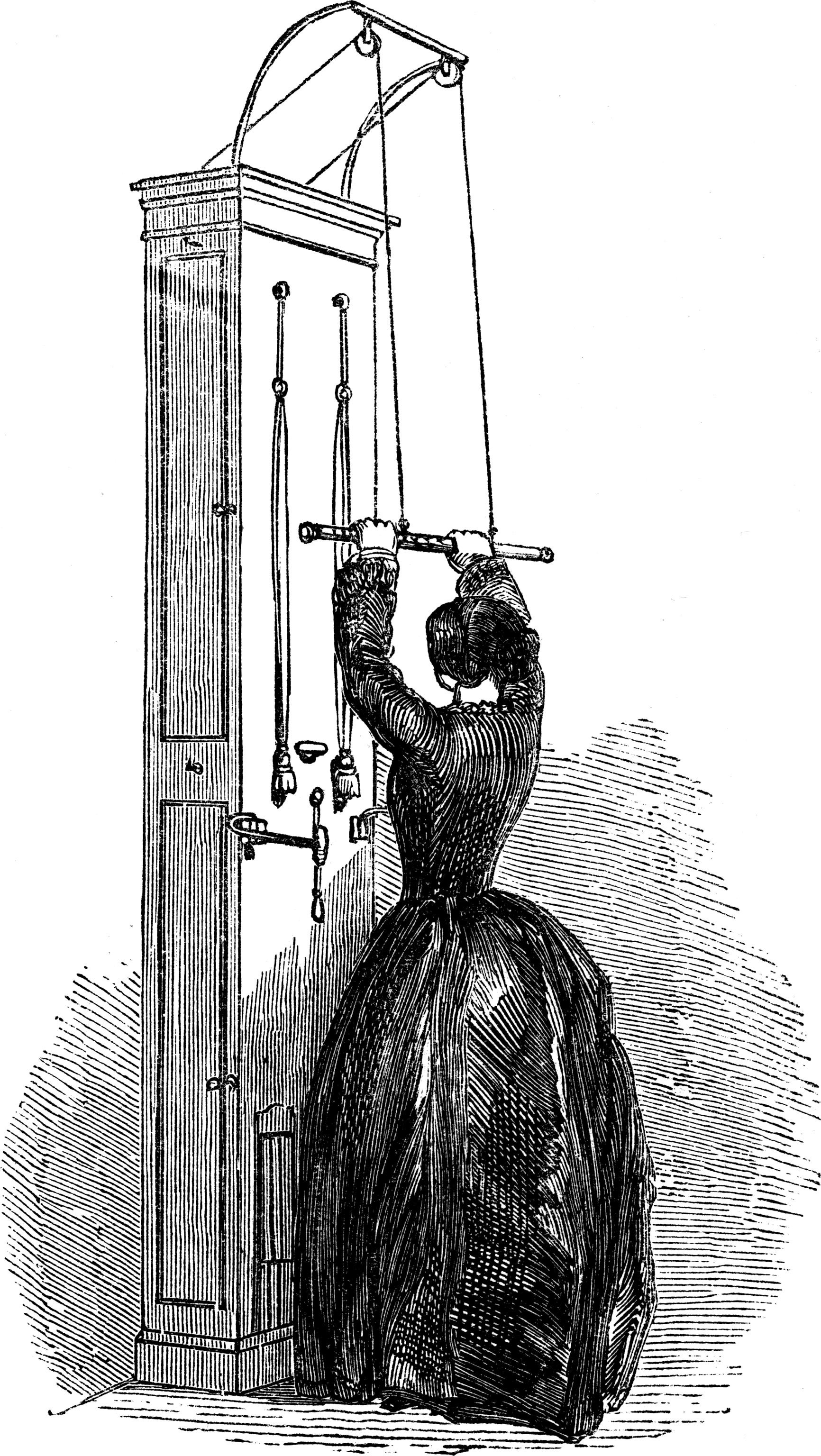 a page